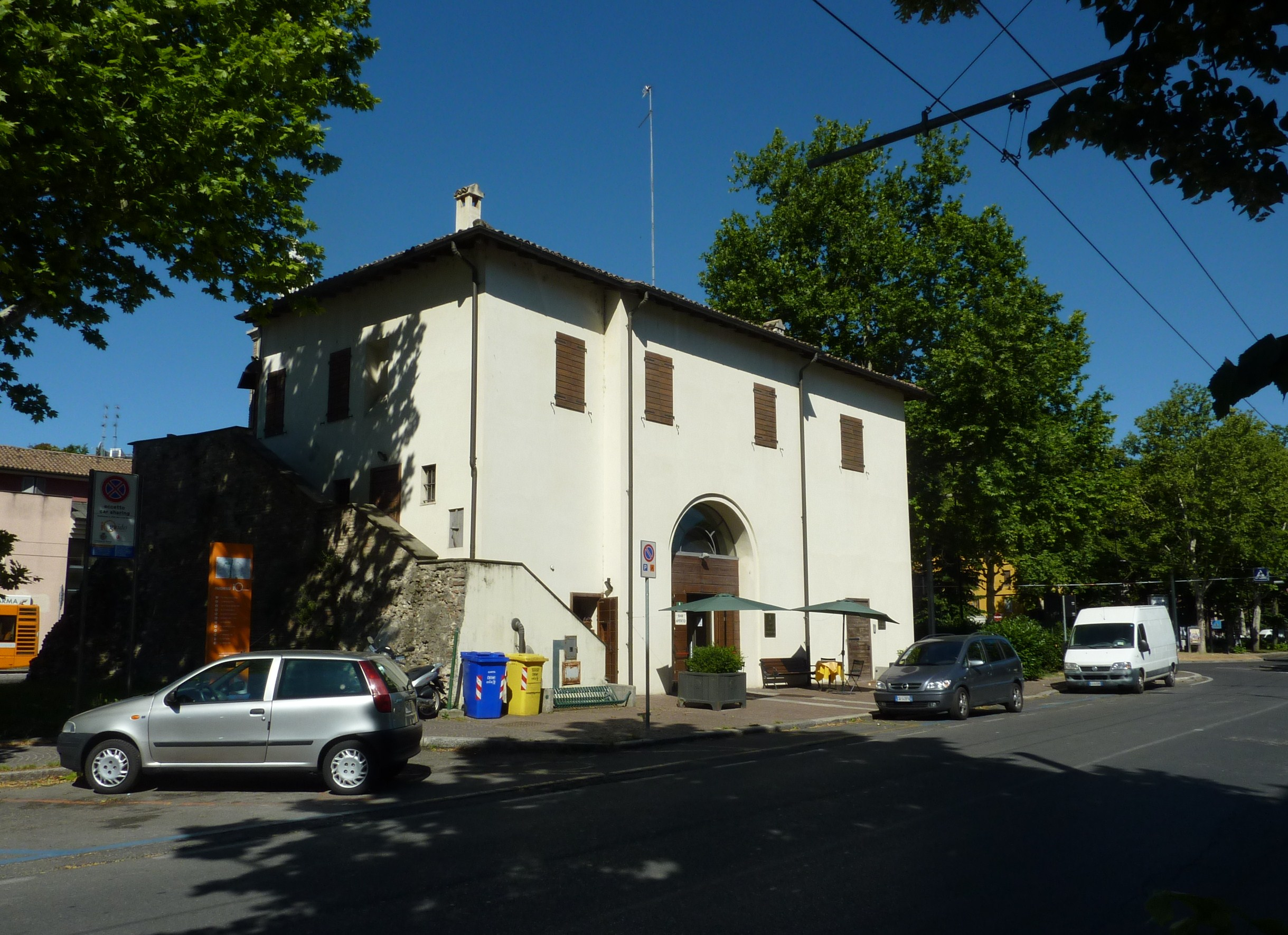 La sede della Famija Pramzana a Parma, nei pressi di Barriera Bixio.